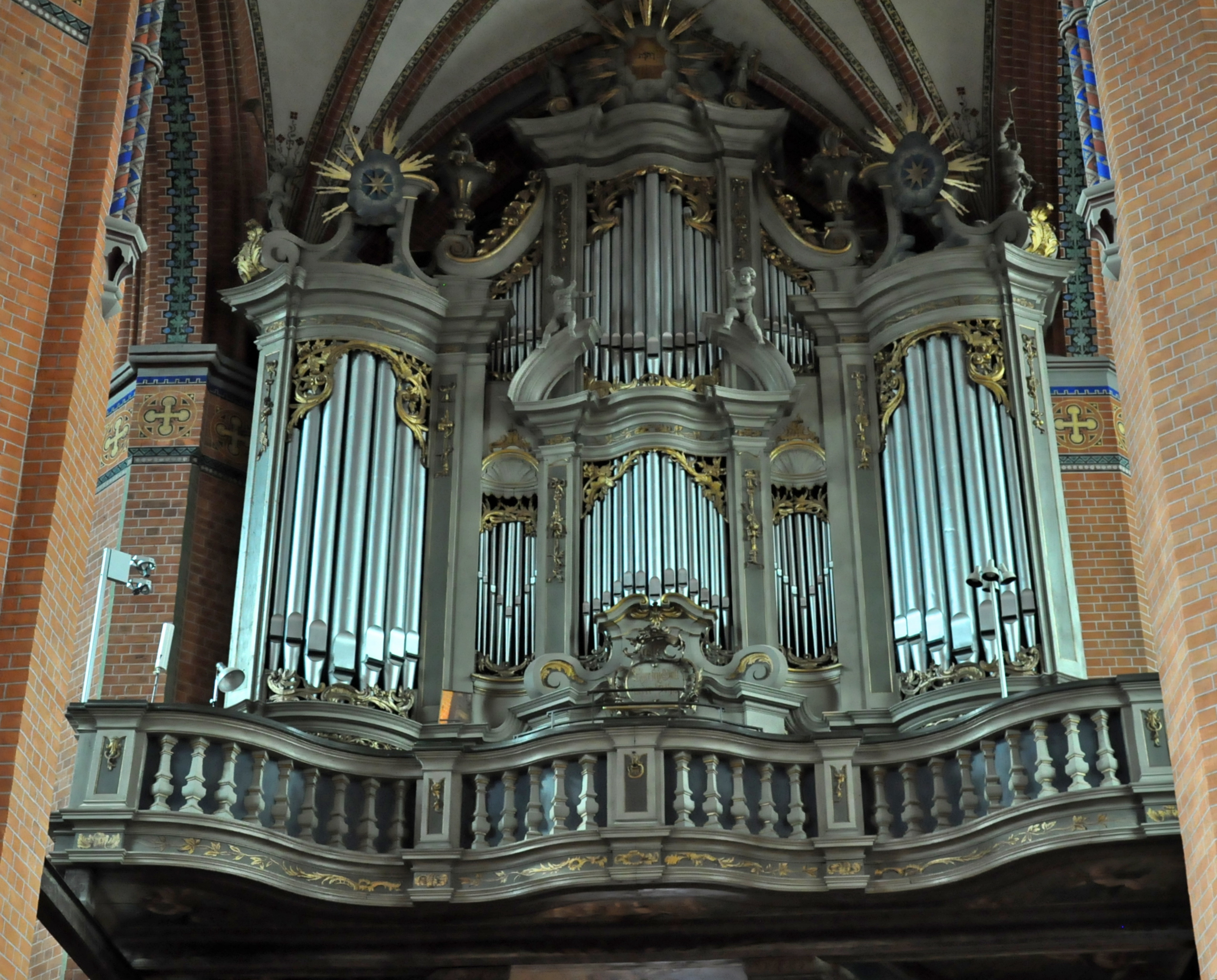 Orgel in der der Pfarrkirche St. Marien, Güstrow, Mecklenburg-Vorpommern